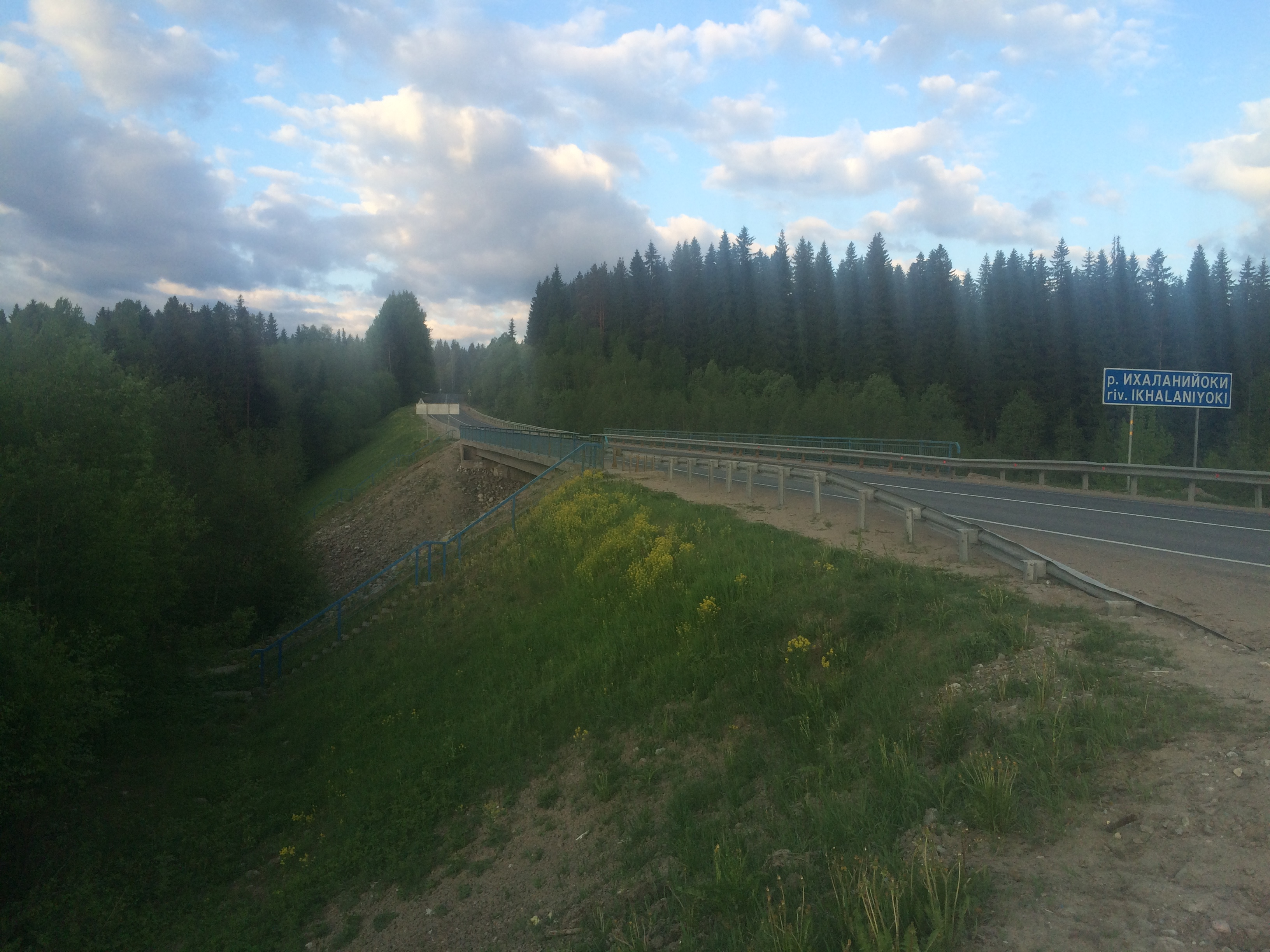 Трасса "Сортавала" через р. Ихаланйоки.